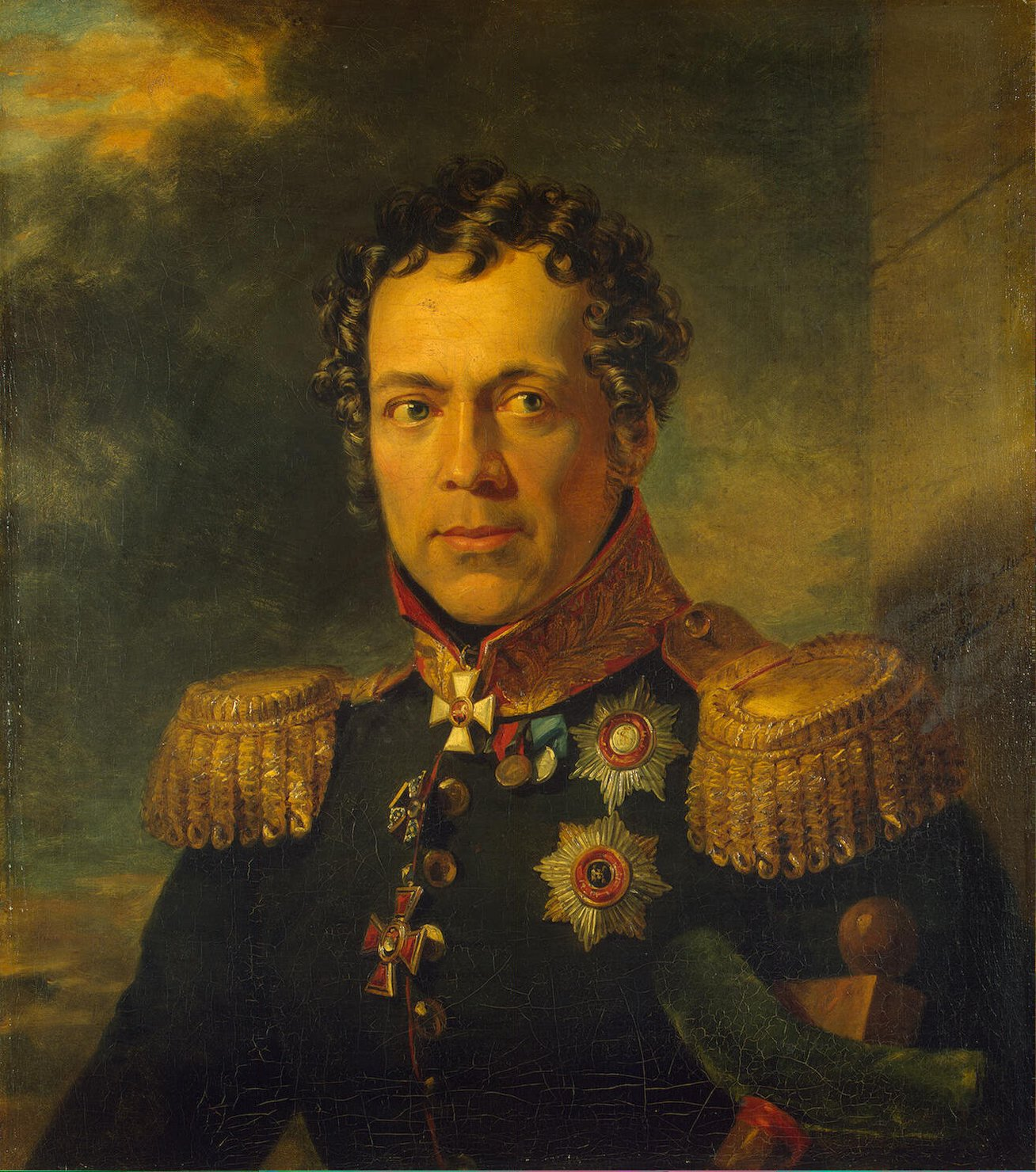 Russian general